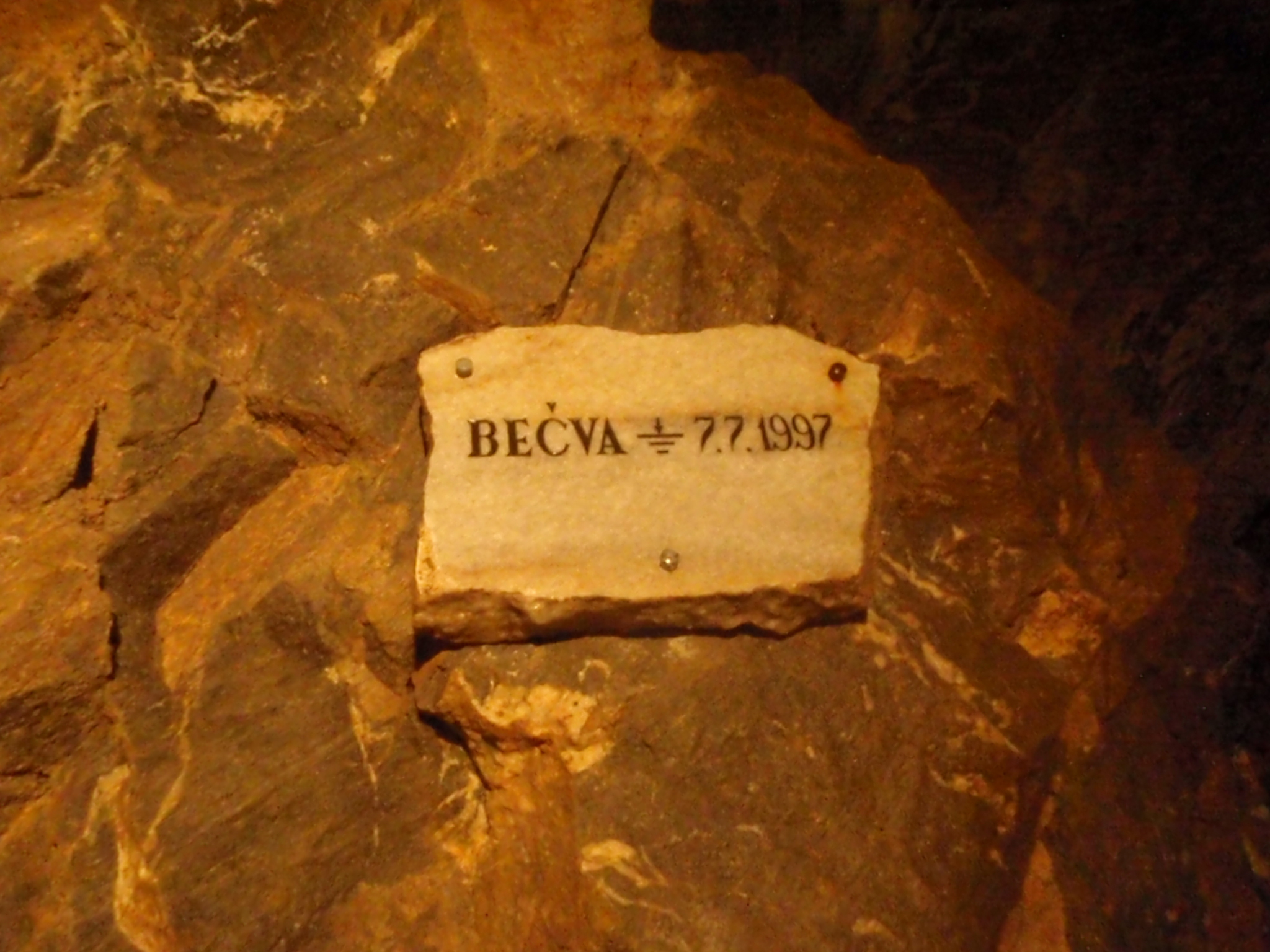 Povodeň 1997 ve Zbrašovských aragonitových jeskyních